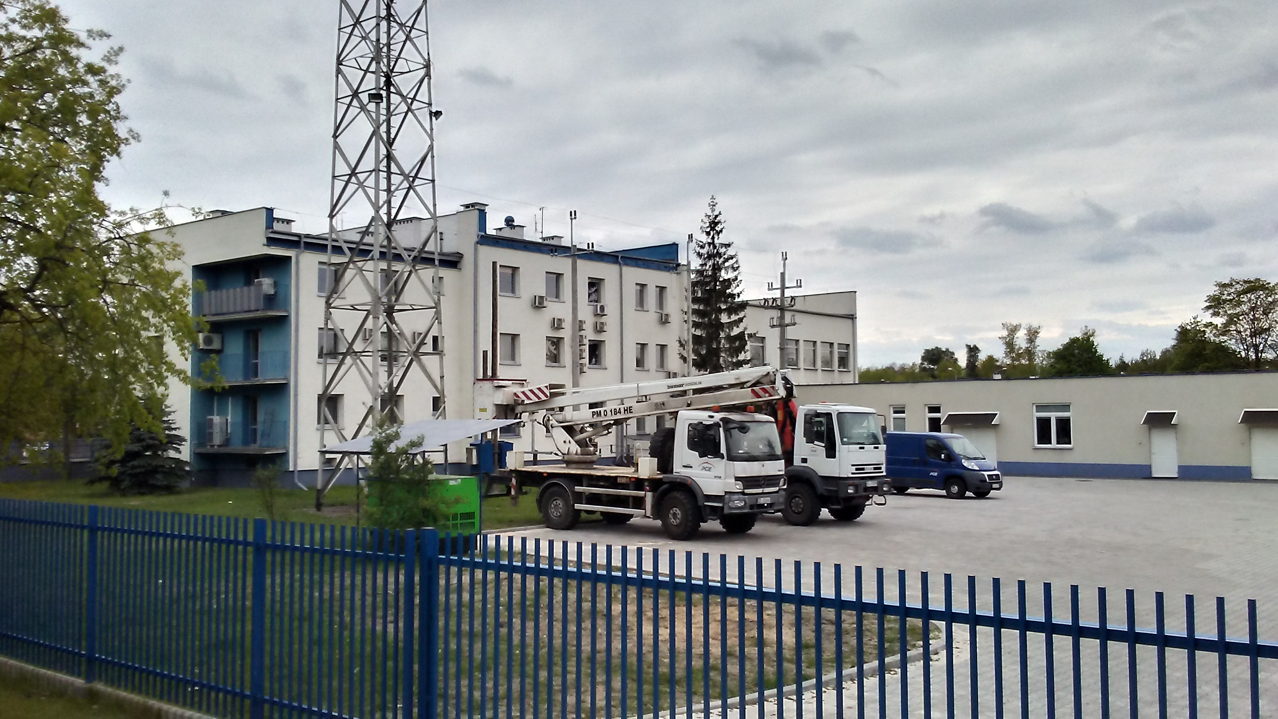 Tomaszów Mazowiecki w województwie łódzkim, PL, EU. Tomaszowski oddział Polskiej Grupy Energetycznej (PGE). CC0